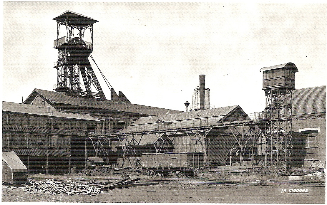 La Fosse n° 5 de la Compagnie des mines de l'Escarpelle était un charbonnage constitué d'un seul puits situé à Douai (Dorignies), Nord, Nord-Pas-de-Calais, France.